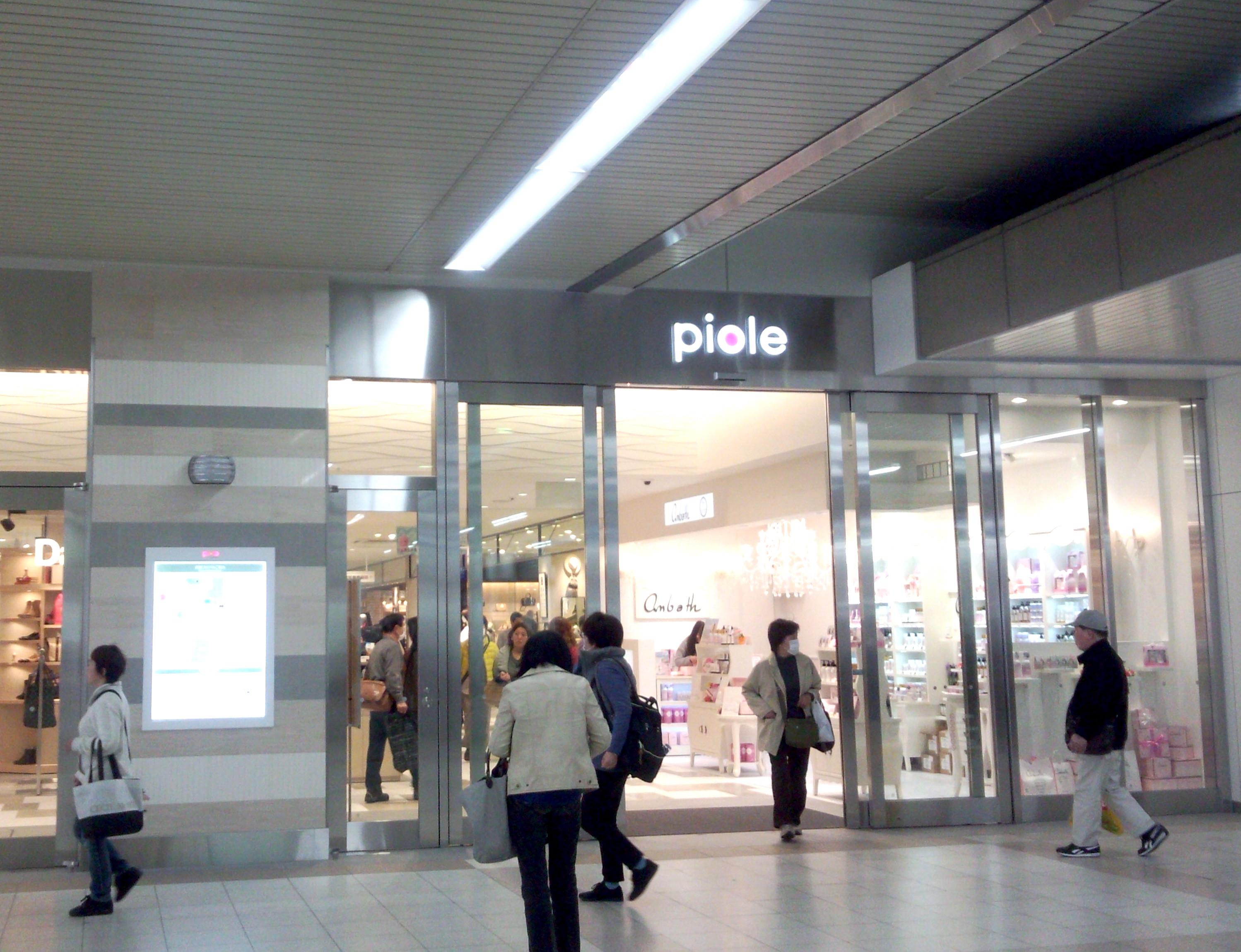 ピオレ明石西館